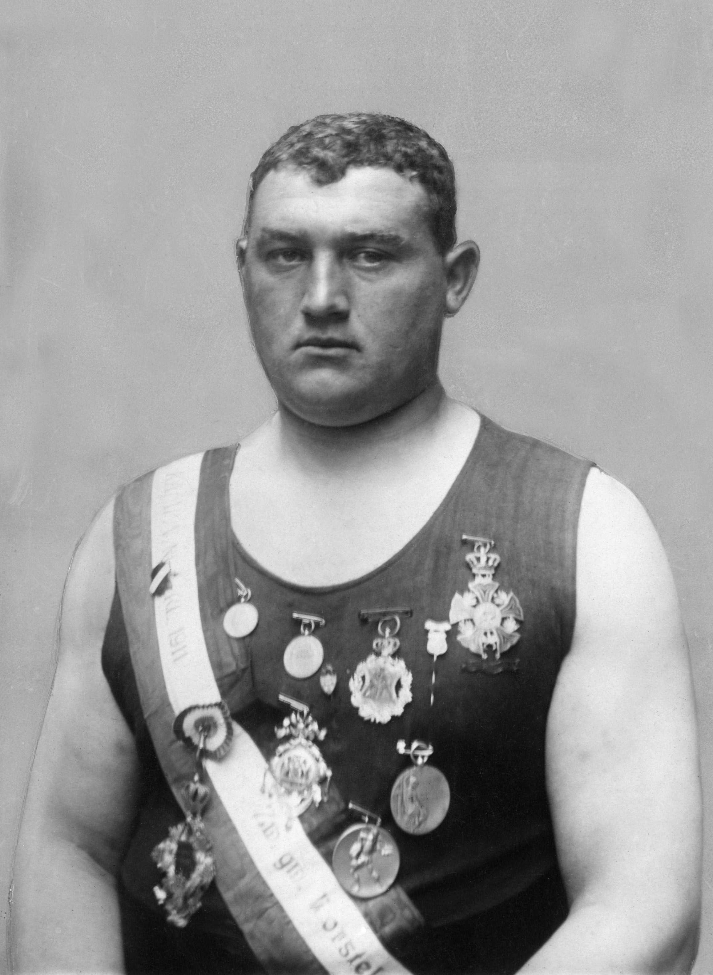 Worstelen, historie. Zwaargewich Barend Bonneveld deelnemer aan het Grieks-Romeins worstelen op Olympische Spelen van 1912 in Stockholm, Zweden.